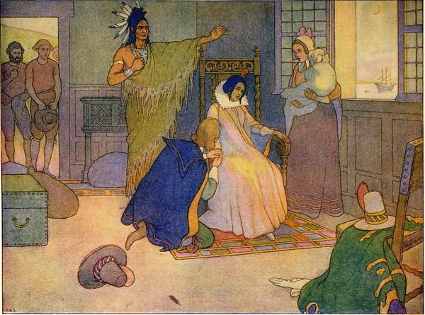 Pocahontas, 1906, par Elmer Boyd Smith.